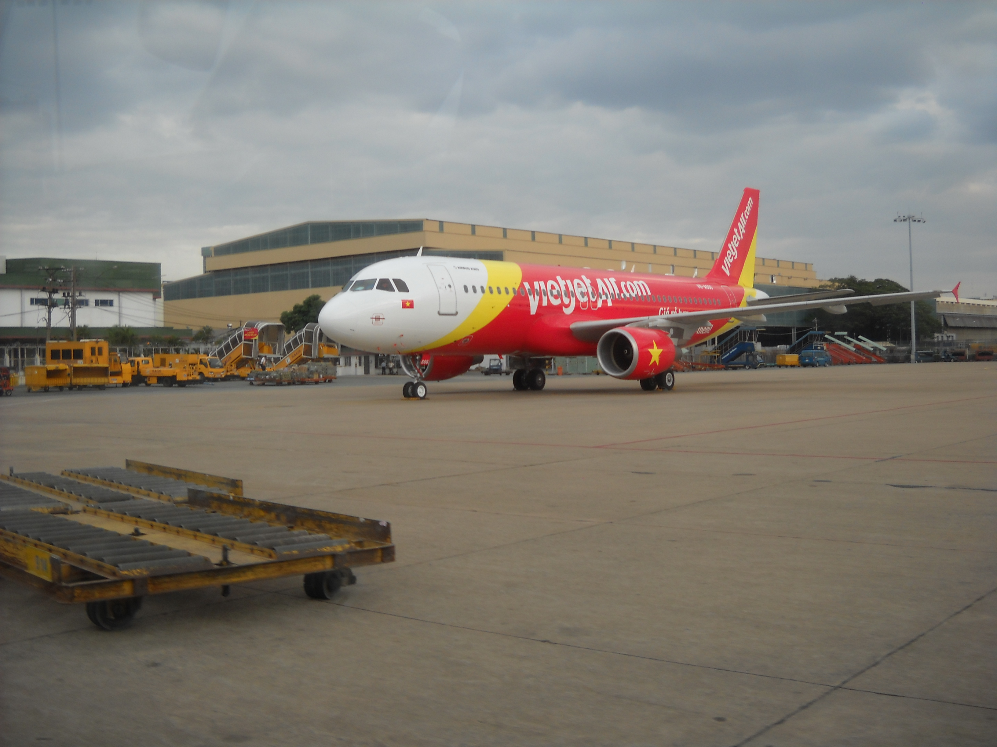 VietJet Air VN-A666 at VVTS